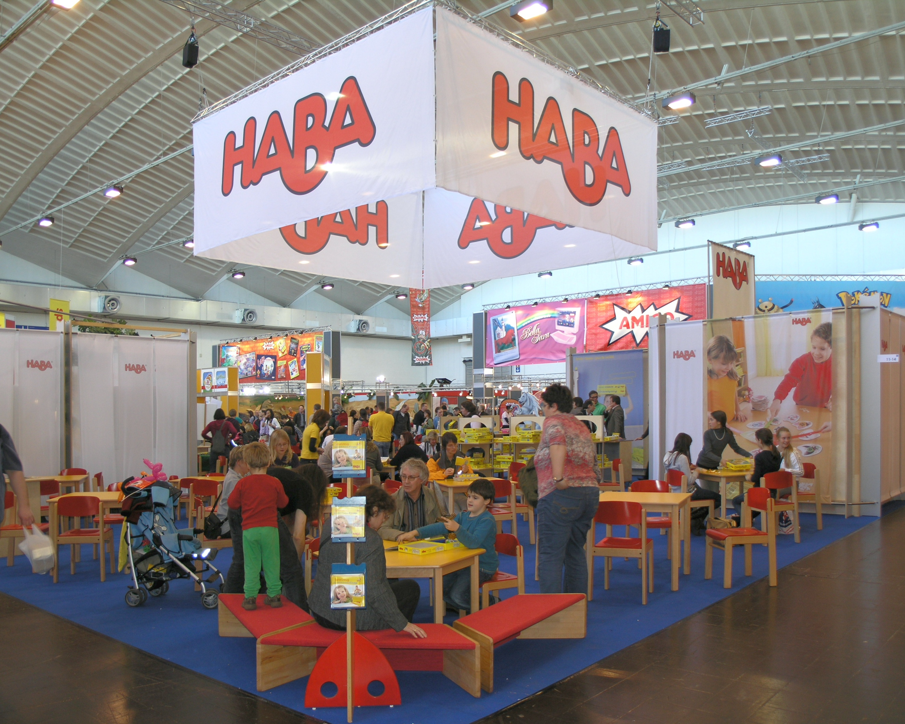 Internationalen Spieltage SPIEL 2008